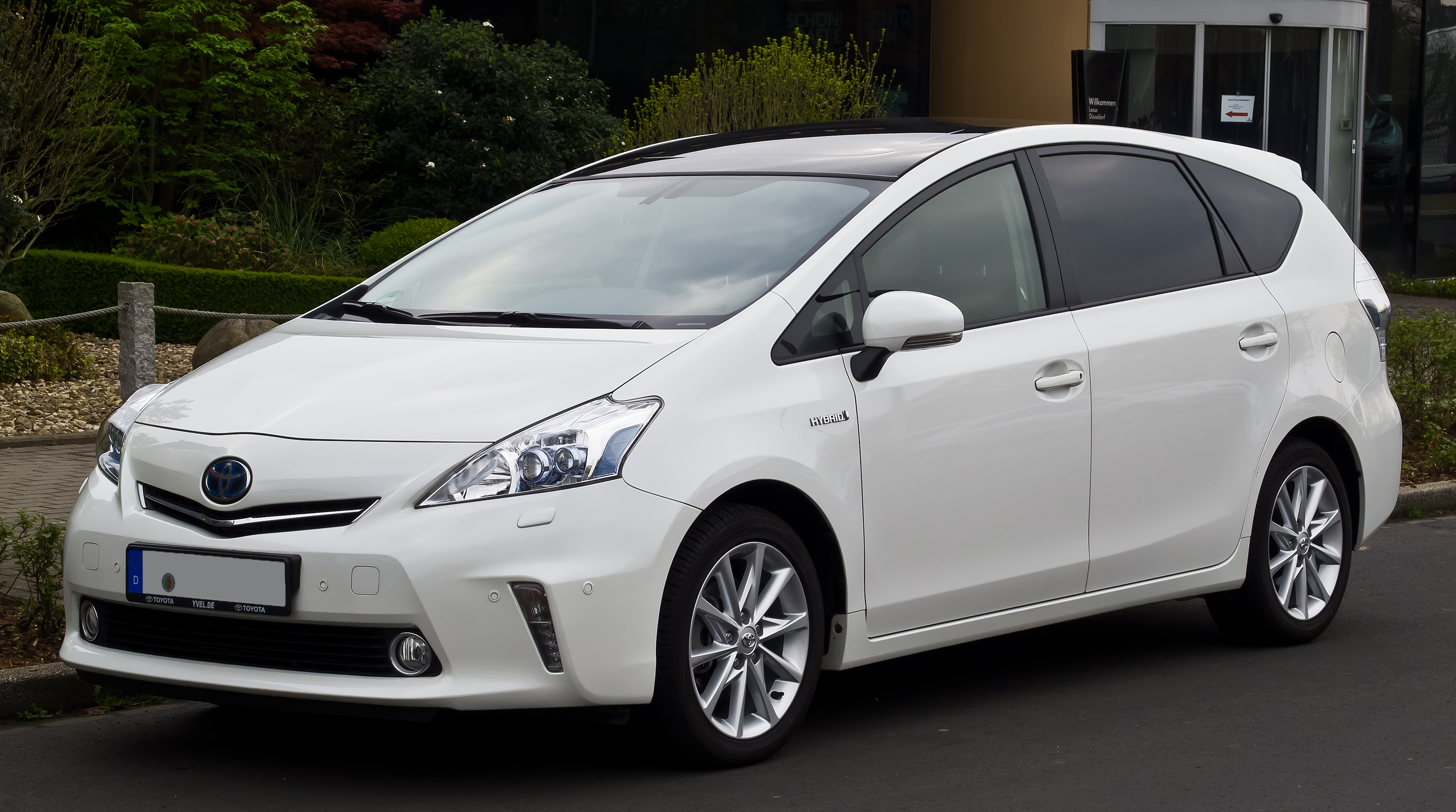 Toyota Prius+ Executive